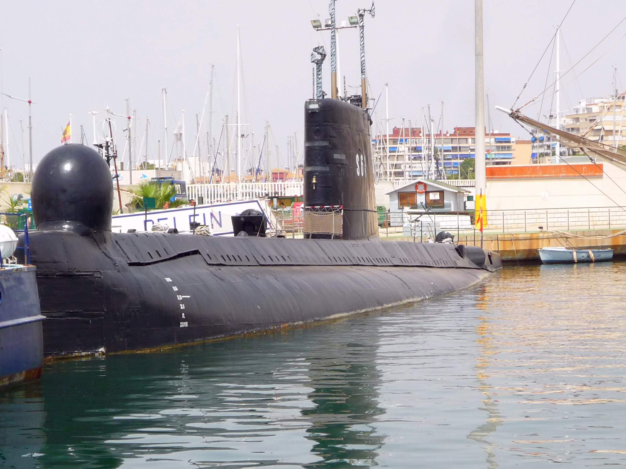 Torrevieja - Museo Flotante, Submarino S-61